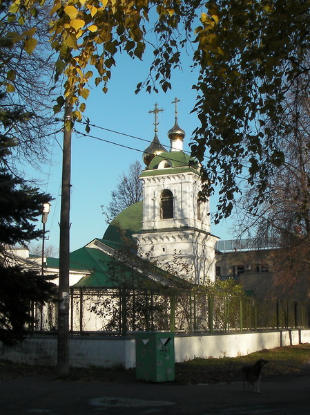 Кирпичная кладбищенская церковь, построенная в 1774 на средства купца С. Вишнякова. Постоянной службы в ней не было, а проводилось отпевание. Возле церкви были захоронения служителей церкви и знатных людей города, а в левом дальнем углу кладбища были могилы австрийских солдат и офицеров, плененных в Первую империалистическую войну 1914 года. В октябре 1926 года горисполком принял решение о запрещении похорон на кладбище и закрытии церкви. Решением городских властей в августе 1927 года часть церковного имущества храма была передана общине верующих села Масканур. Могилы сравняли с землей. Храм пришёл в запустение, лишился своей главы и колокольни. В начале 90-х годов XX века церковь была реконструирована, и в ней проходят богослужения. Проведенная реконструкция возродила храм в несколько ином виде. Церковь находится на территории центрального парка культуры и отдыха им. XXX-летия ВЛКСМ.